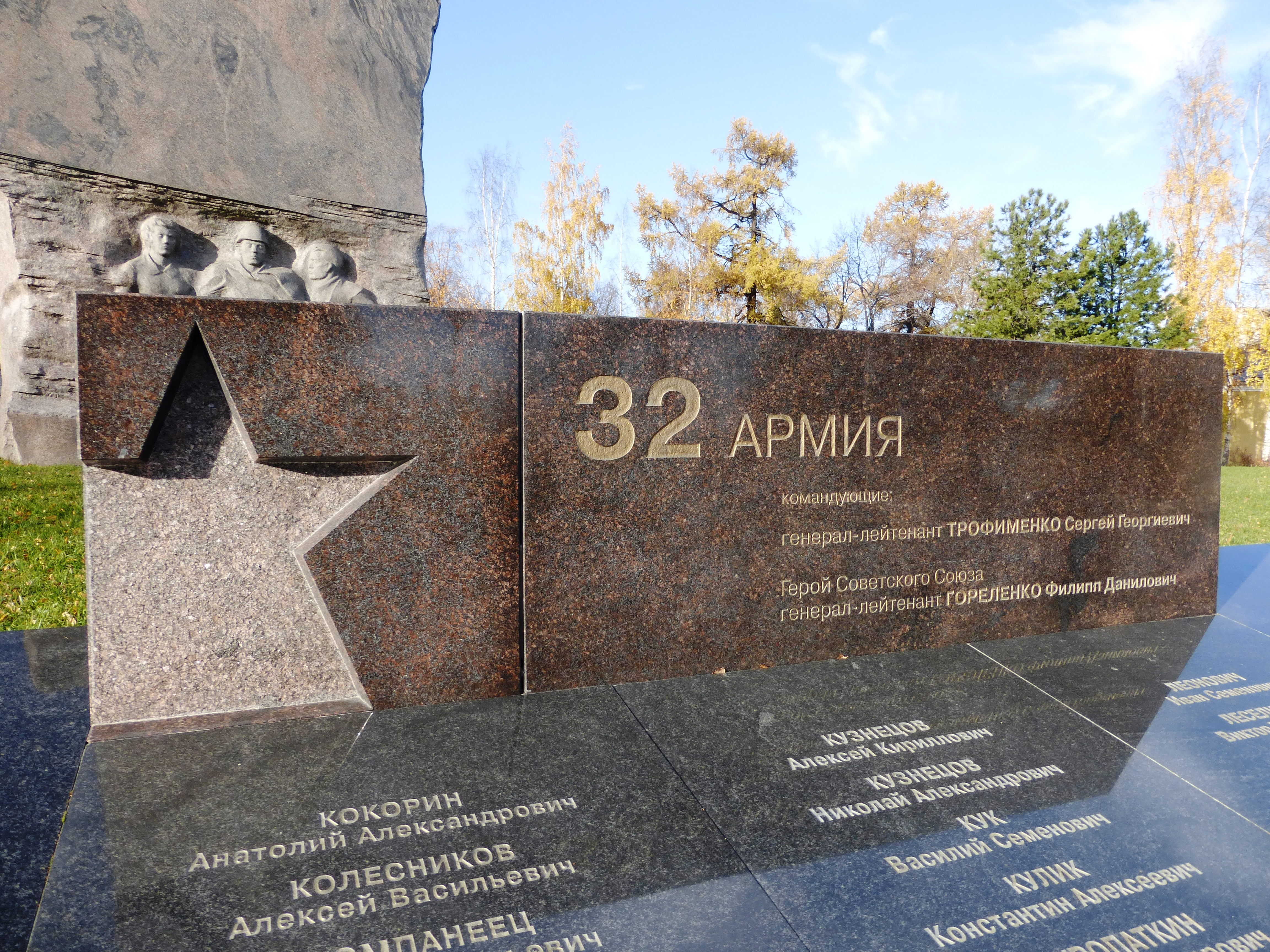 Фрагмент военно-мемориального комплекса Карельского фронта «Аллея памяти и славы» в Петрозаводске